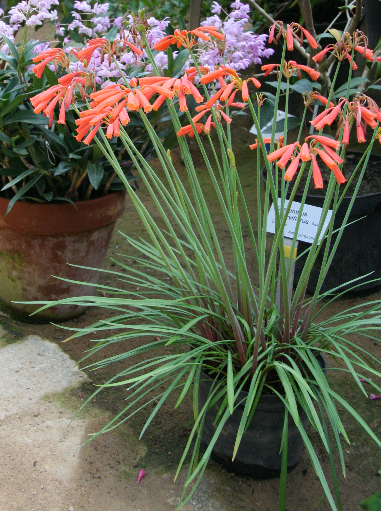 Cyrtanthus parviflorus im Botanischen Garten Bayreuth